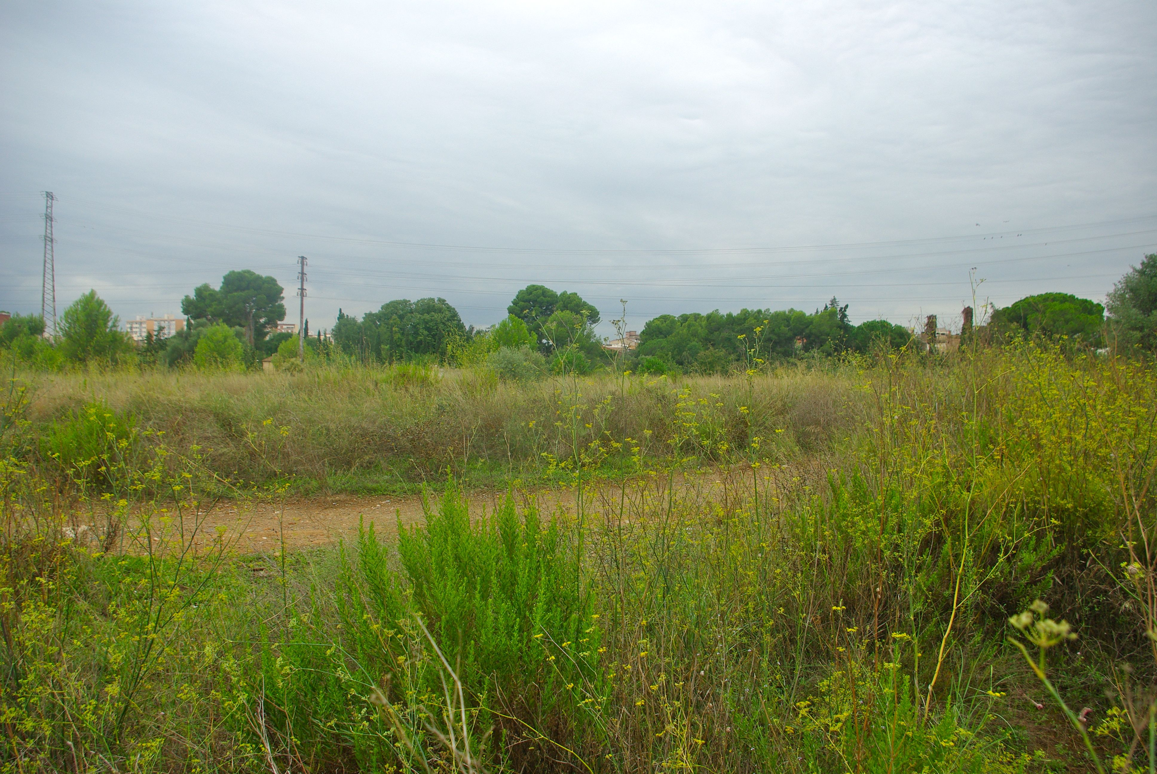 Partida dels Estellers al terme de Reus